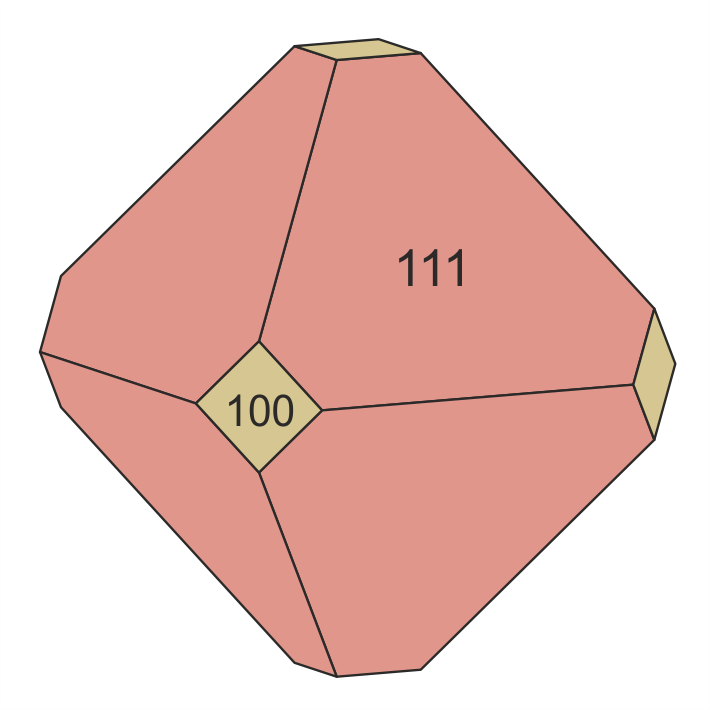 Zeichnung eines Oxycalciopyrochlor-Kristalls als Kombination aus Oktaeder {111} und Hexaeder {100}.